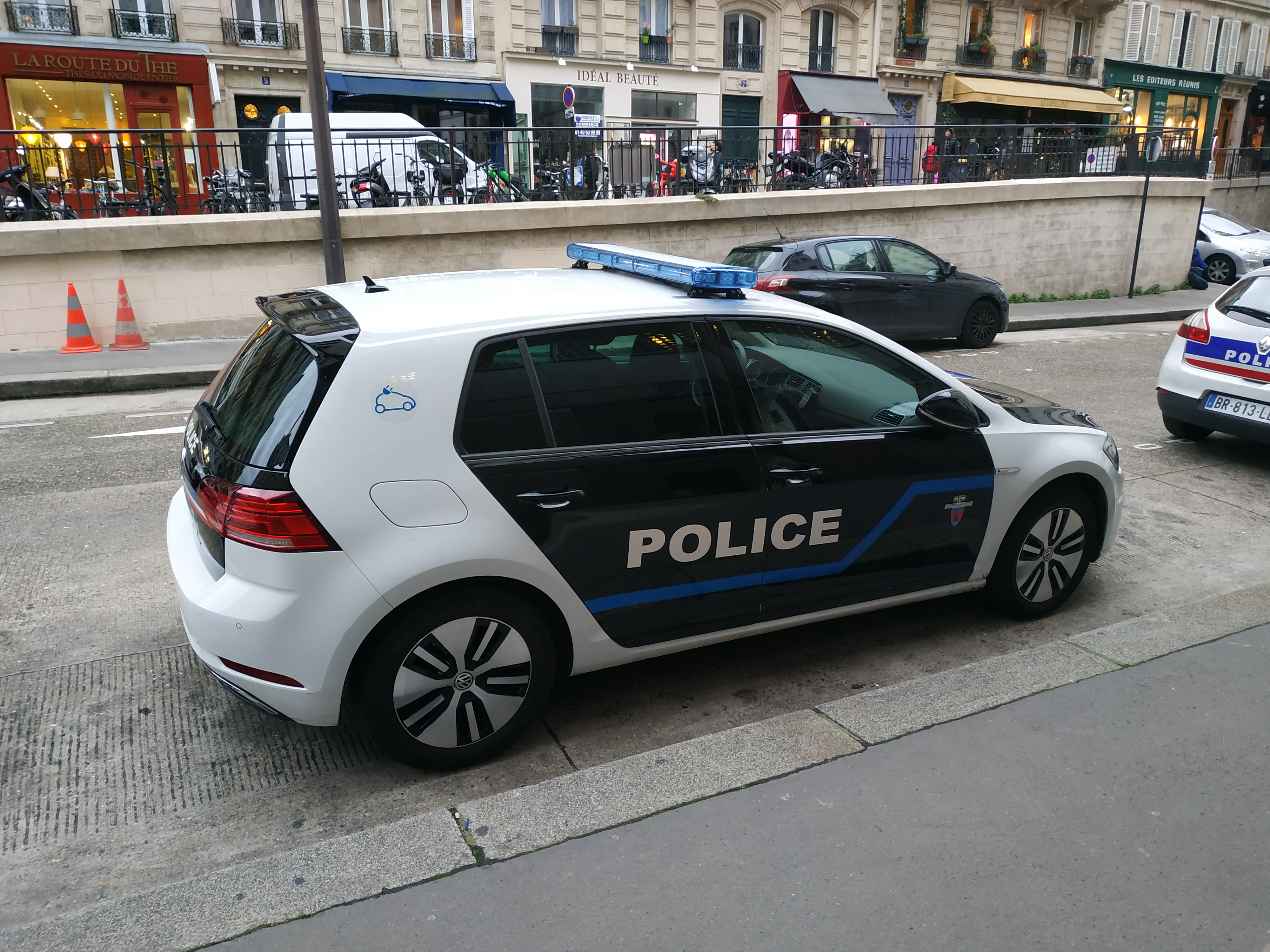 Volkswagen e-Golf de la préfecture de police de Paris, à proximité du commissariat du 5e arrondissement. La livrée est celle propre à la Prefecture de police de Paris malgré l'appartenance à la Police nationale.